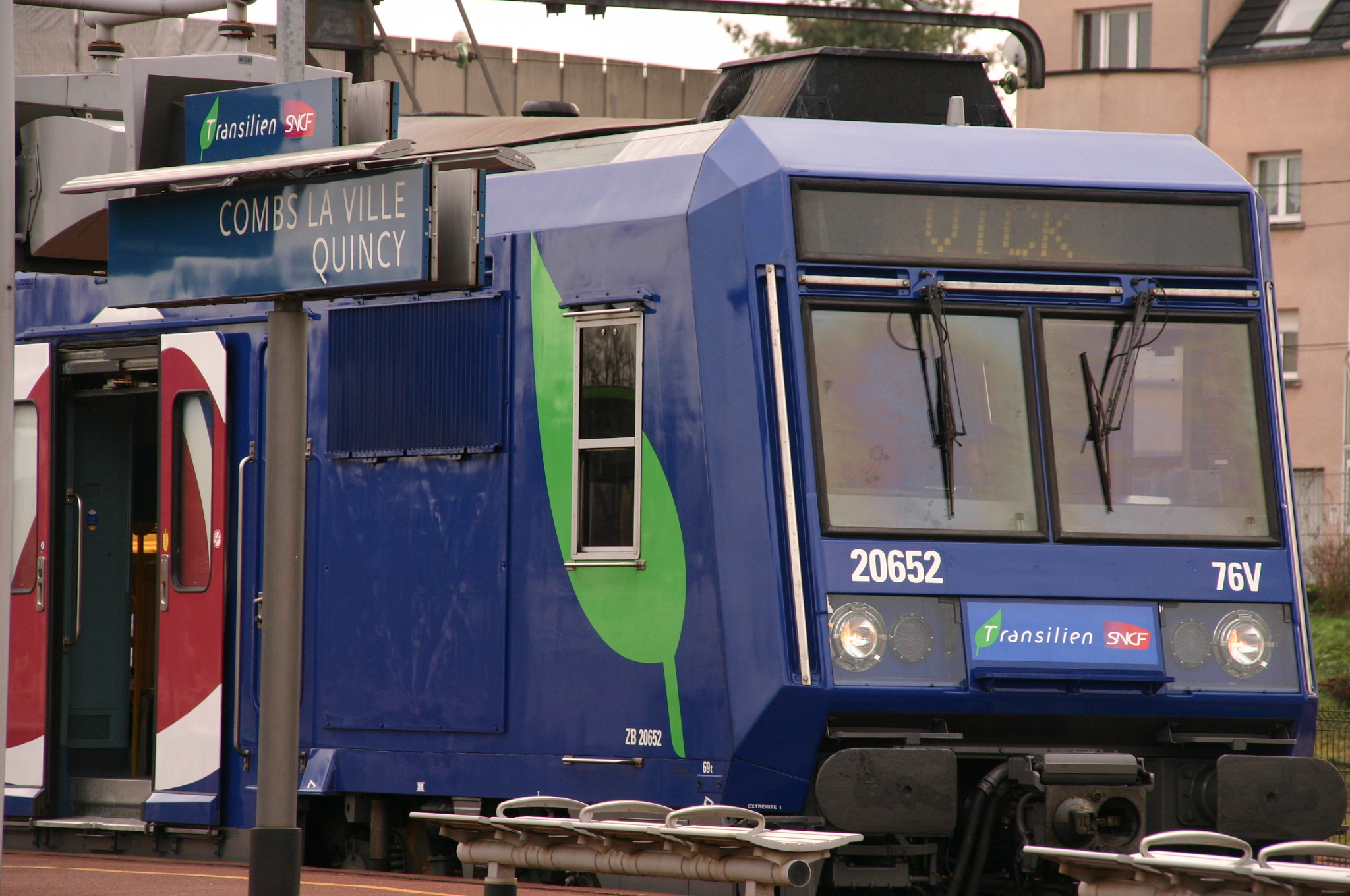 La gare de Combs-La-Ville - Quincy , Combs-La-Ville , département de la Seine-et-Marne, France